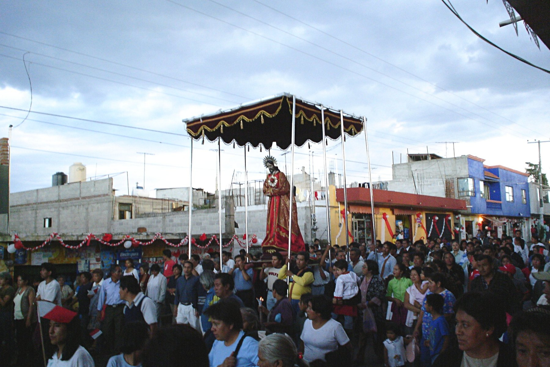 Esta fotografia forma parte de un recorrido que hacen con la imagen por varias comunidades de la ciudad de Chiautempan. En esta ocasión, la procesión pasa frente a mi casa.